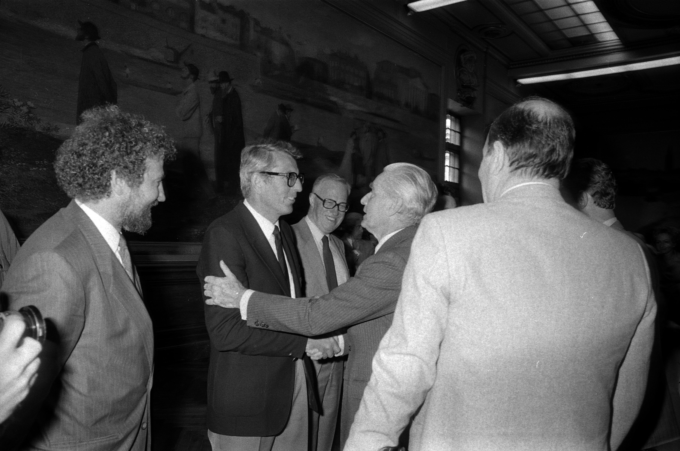 Le Capitole. Le 28 Mai 1985. Vue de A. Brouat, Jacques Chaban-Delmas, Jean Fabre et François Mitterand (?) de dos, après la victoire du Stade Toulousain en finale contre le RC Toulon.